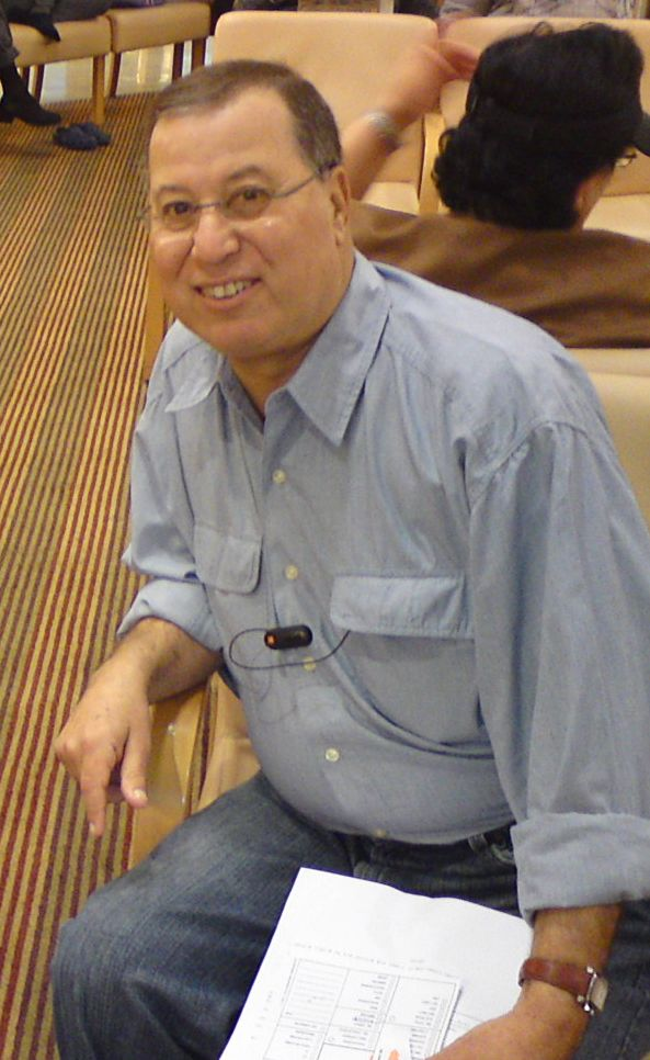 רון נחמן